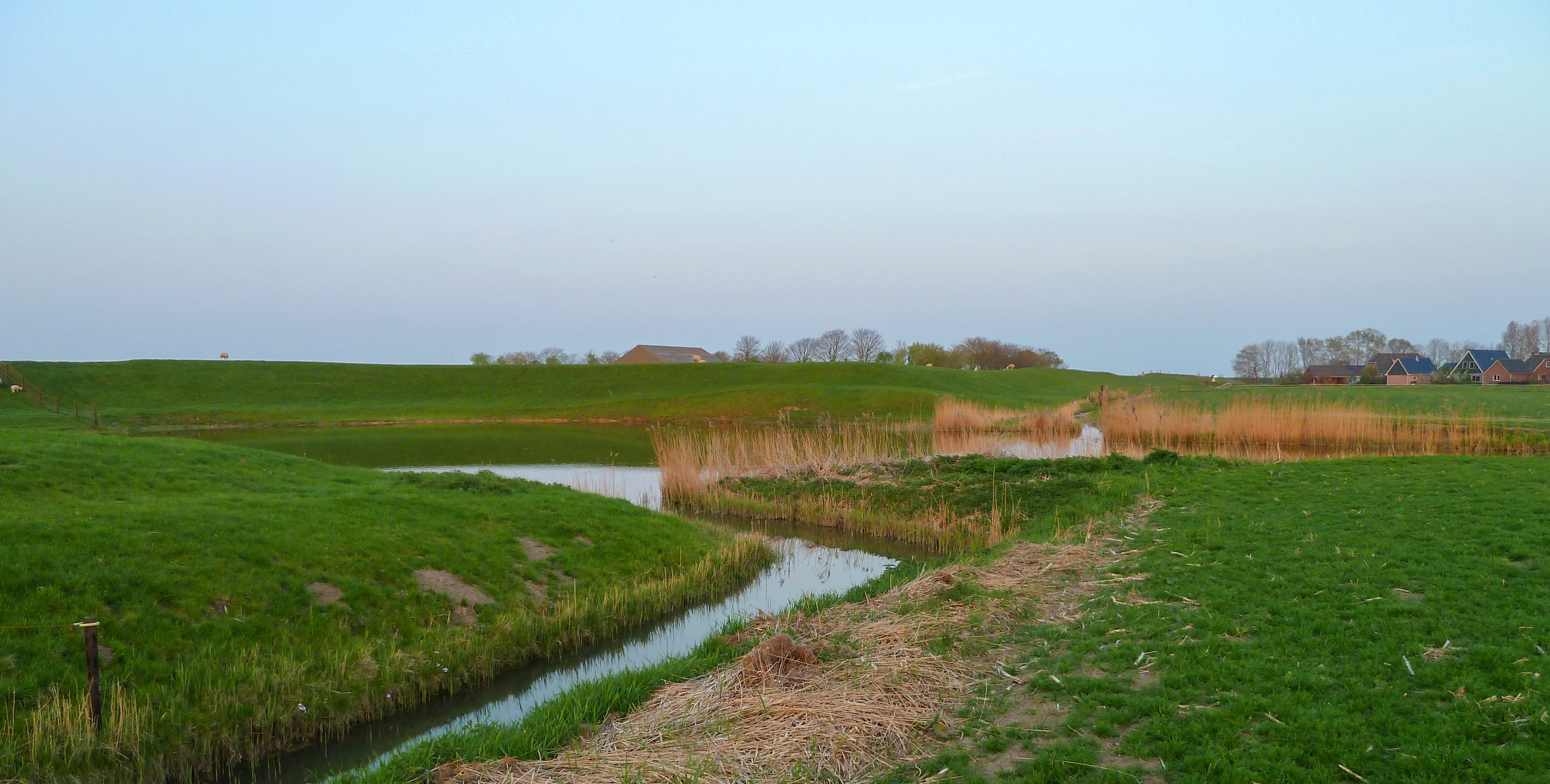 Schevekolk gezien vanuit het zuidoosten